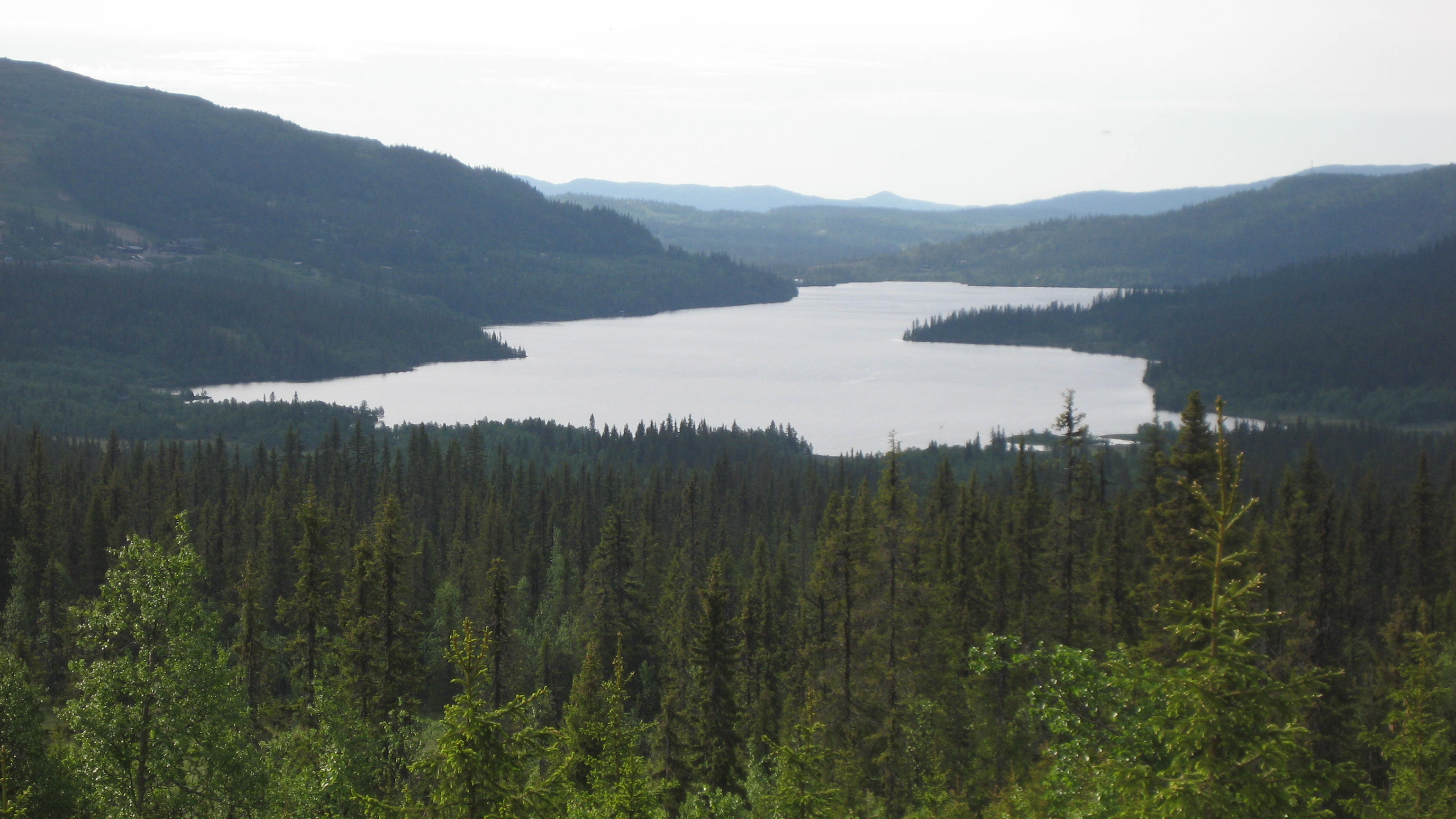 Synnfjorden i Torpa